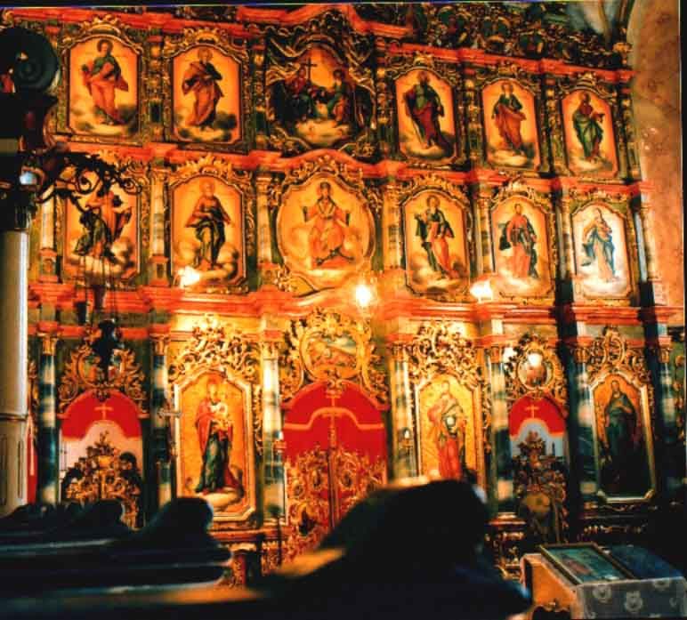 иконостас нештинског храма